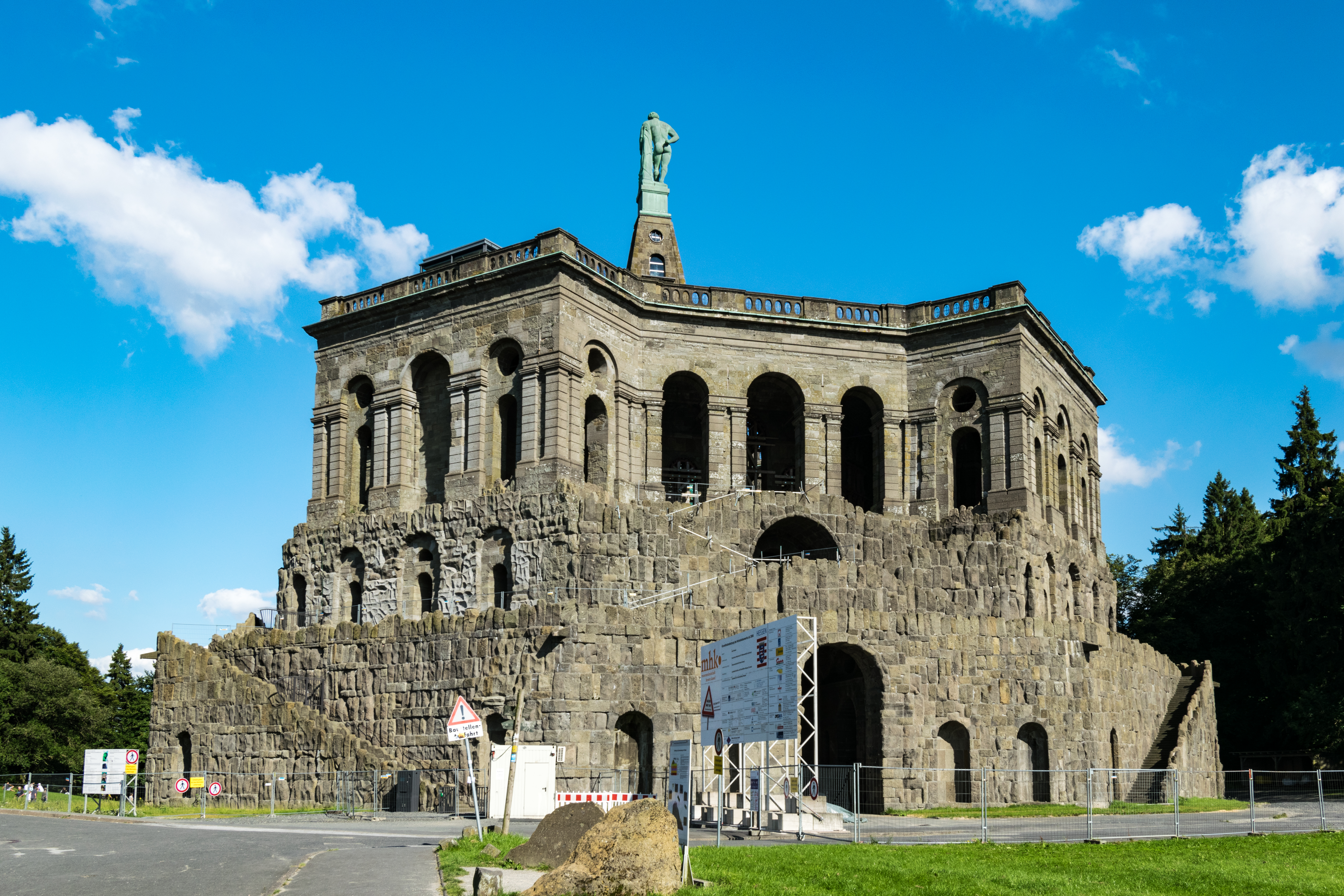 Der Herkules auf dem Oktogon Im Bergpark Wilhelmshöhe an der Westseite